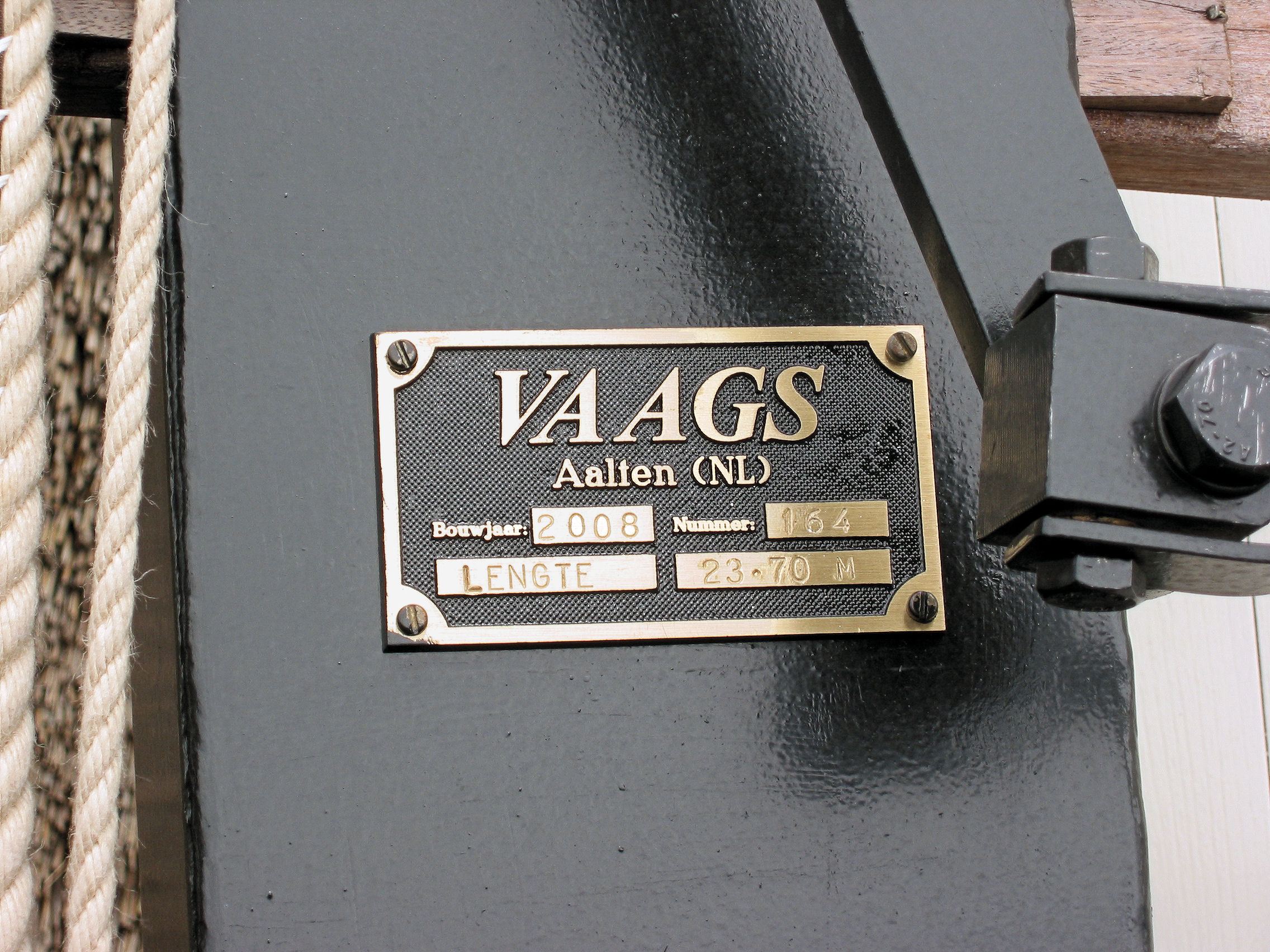 Buitenroe van molenmaker Vaags van de Concordia molen te Ede